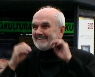 Josef Vejvoda diriguje společné vystoupení orchestrů na festivalu Vejvodova Zbraslav